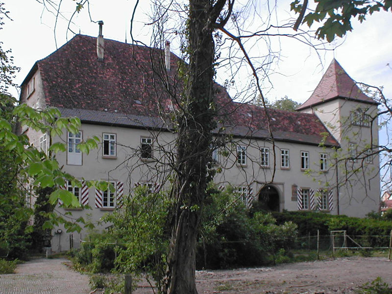 Schloss in Obersulm-Weiler von 1588, mit Wohntrakt aus dem 19. Jhd.